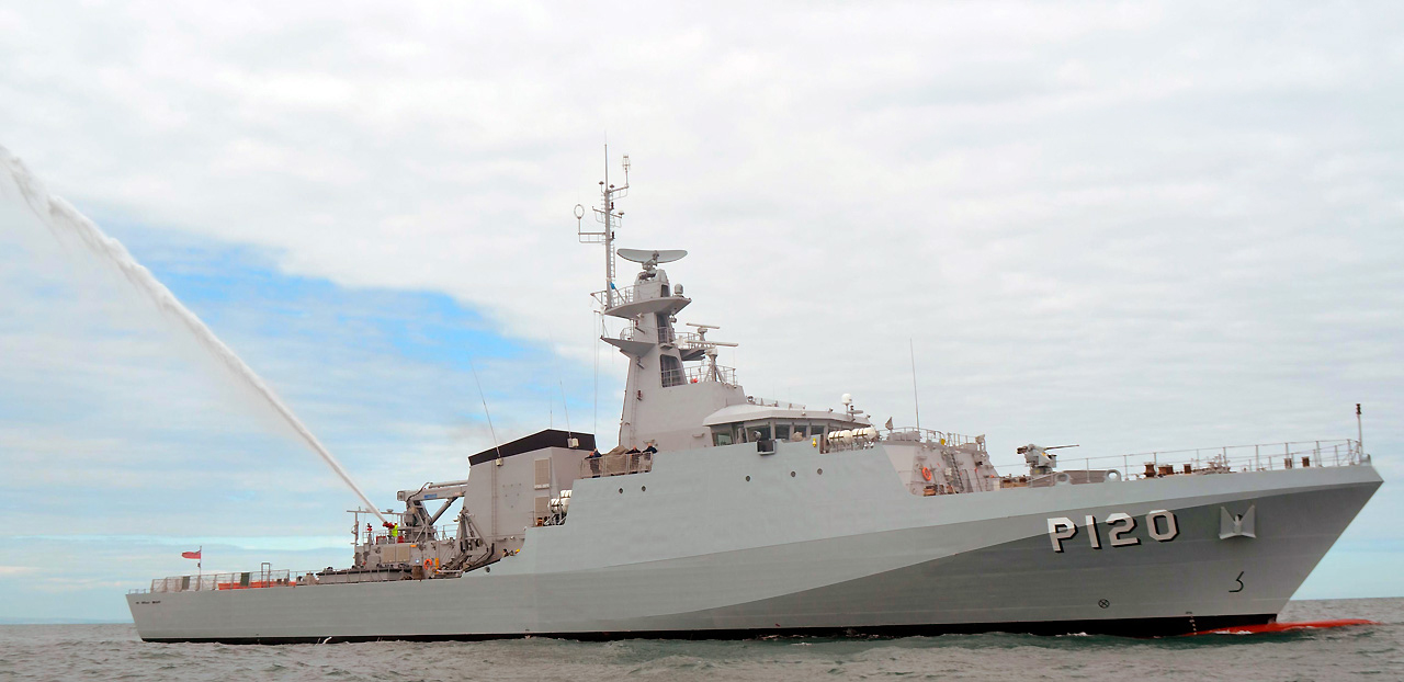 Navio brasileiro utilizado na proteção das nossas fronteiras